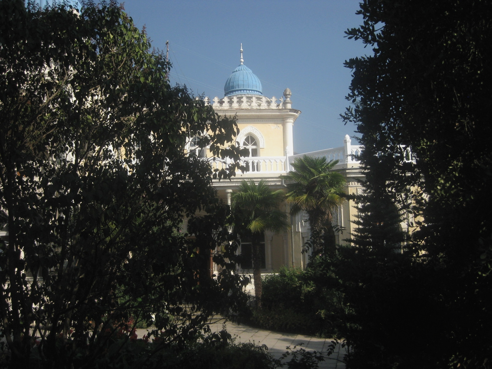 Палац «Еміра Бухарського Сейїд-Абдул-Ахад-Хана», м. Ялта